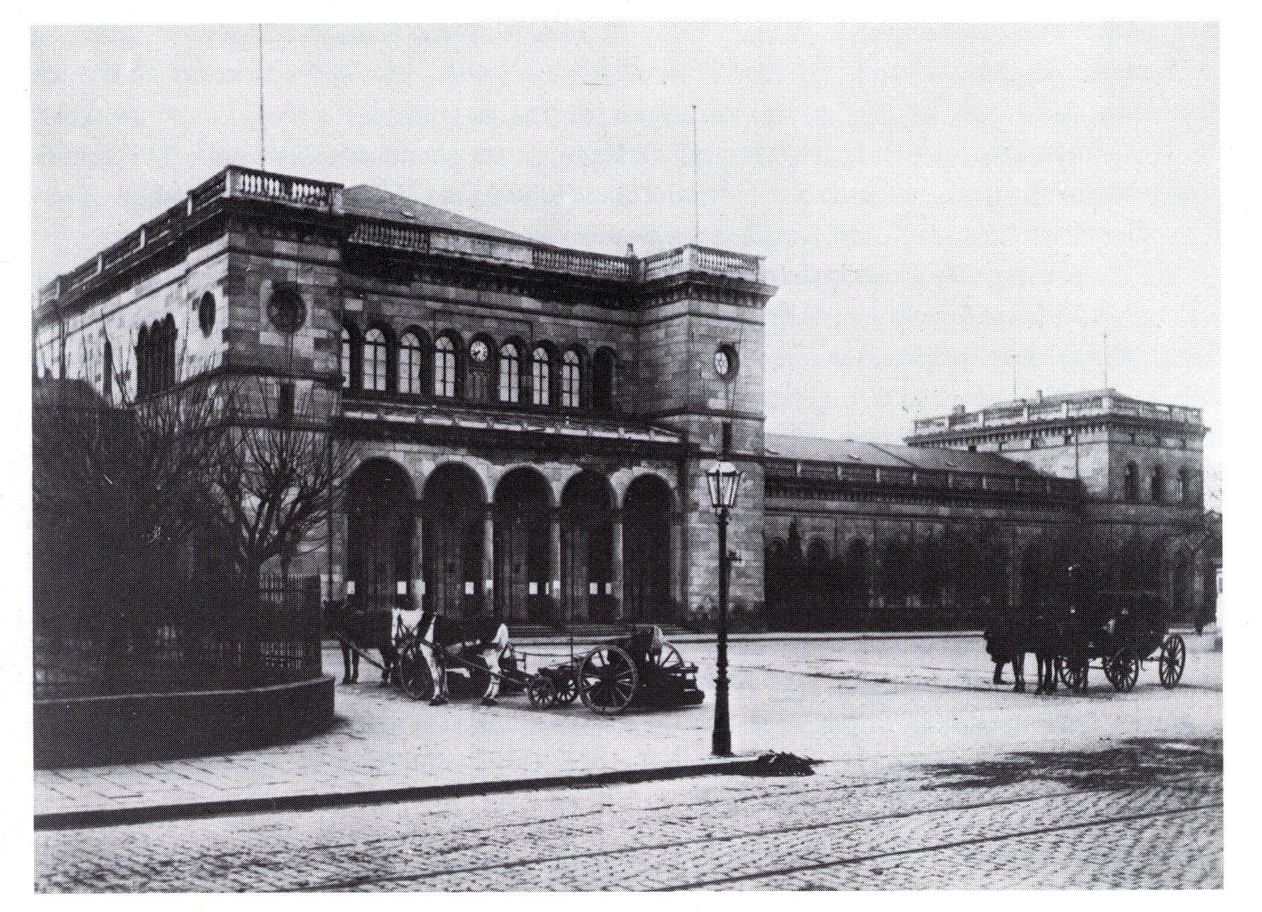 Ehemaliges Bergisch-Märkisches Bahnhofsgebäude am heutigen Graf-Adolf-Platz in Düsseldorf.jpg